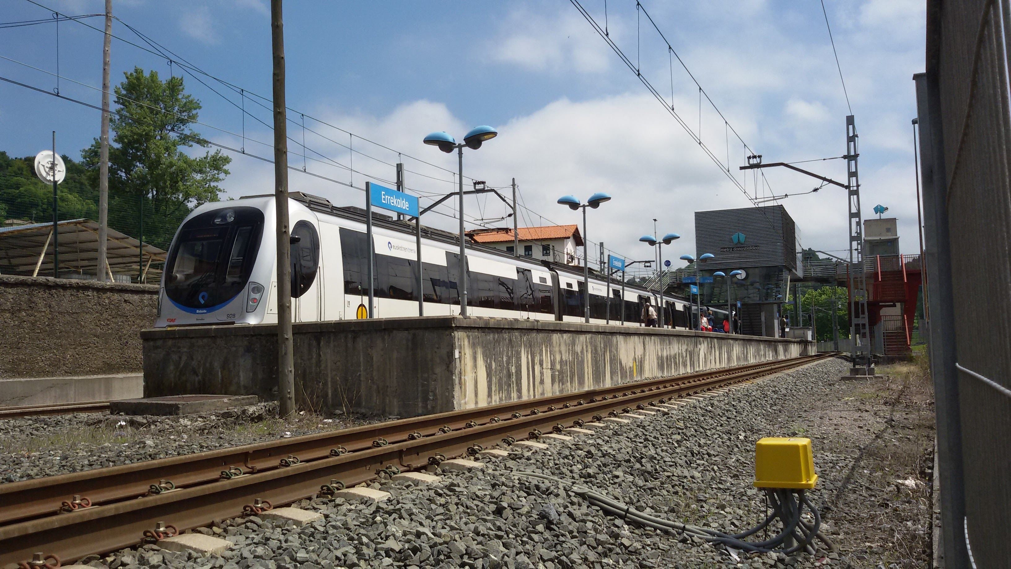 Tren del metro de Donostialdea estacionado en la vía norte de la estación de Errekalde, a punto de partir hacia Hendaia